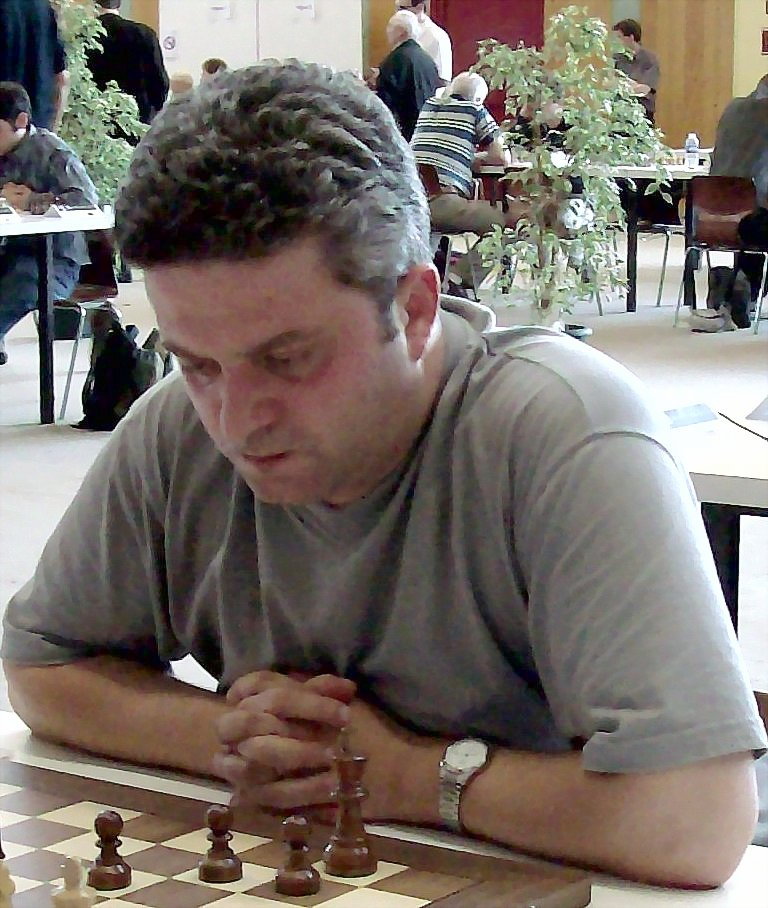 Andrei Istrăţescu, chess grandmaster from Romania